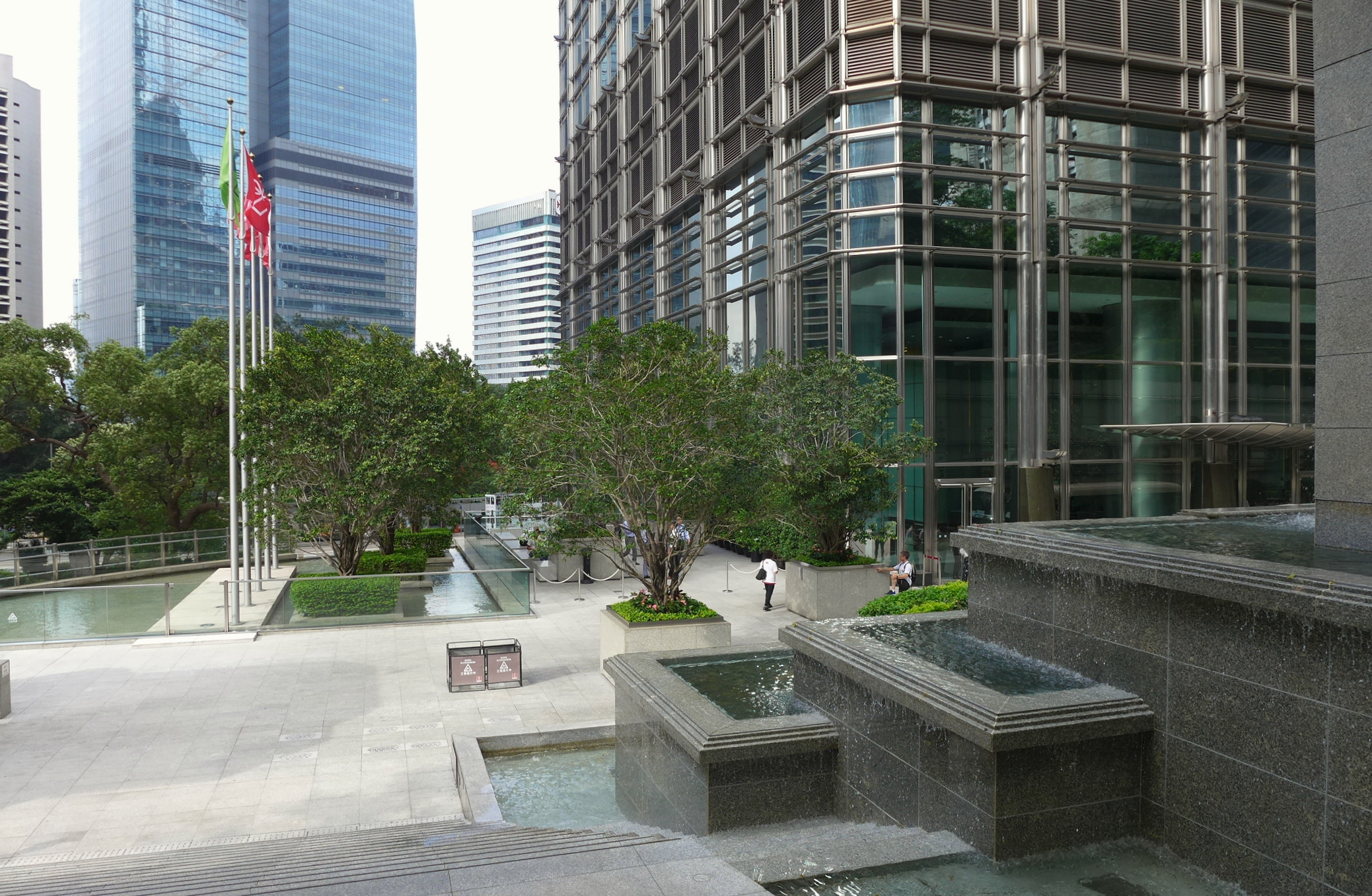 Stairs to Cheung Kung Garden waterfall